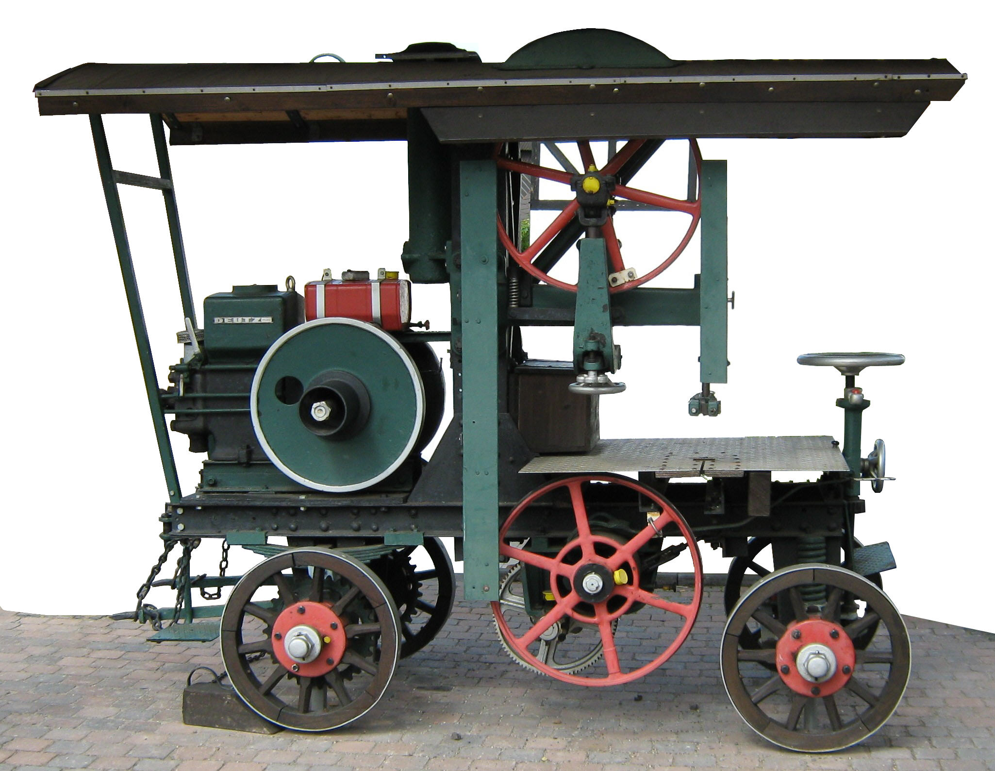 selbstfahrende Bandsäge mit Deutz-Dieselmotor MAH/16 mit Verdampfer, Baujahr 1911, 8 kw (11 PS). Diese Maschine wurde in Kamp (Kamp-Bornhofen) bis in die 1960er Jahre von Josef Kimmel (1903-1980) betrieben. Sie kam hauptsächlich im Winter zum Einsatz, wenn er damit seinen Kunden das Holz schnitt. Inzwischen restauriert steht sie nun unter einem Schutzdach im Ort.